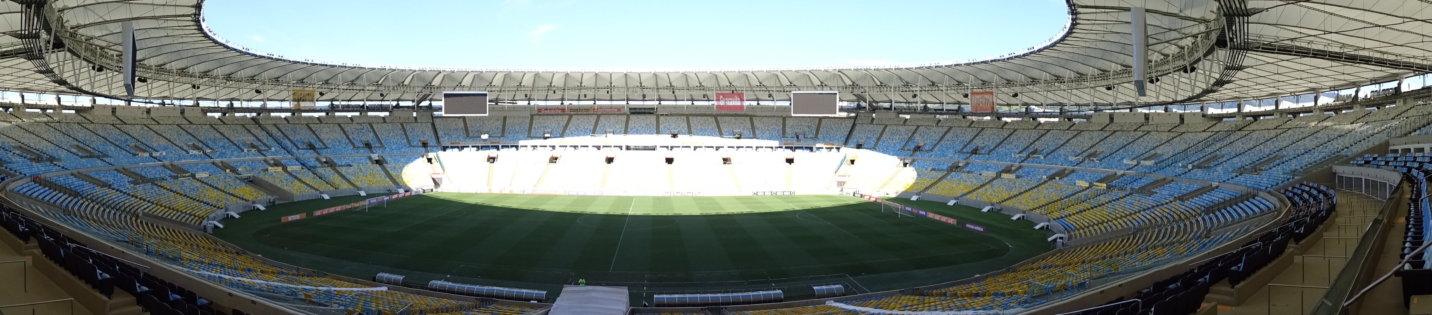 Panorama do Estádio do Maracanã, no Rio de Janeiro.